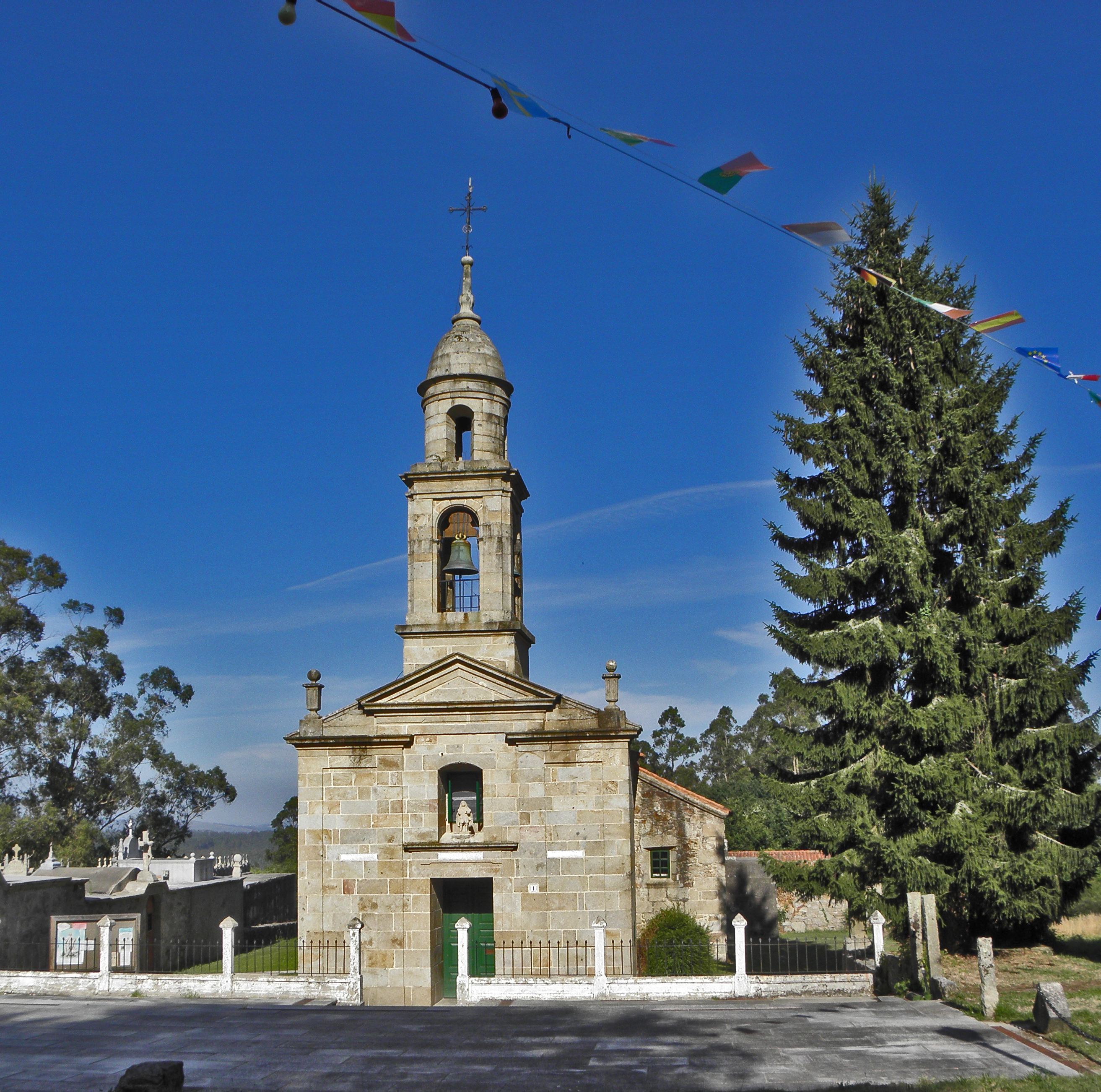 Esta iglesia es un edificio románico del siglo XII,aunque su fachada sea de estilo Neoclasico. Tiene varias imagenes de interés como puede ser la de San Julián (que es el Patrón) o la de San Cristobal de piedra policromada que data del siglo XVI, en el ábside conserva la primitiva cabecera románica con bellas pinturas medievales.